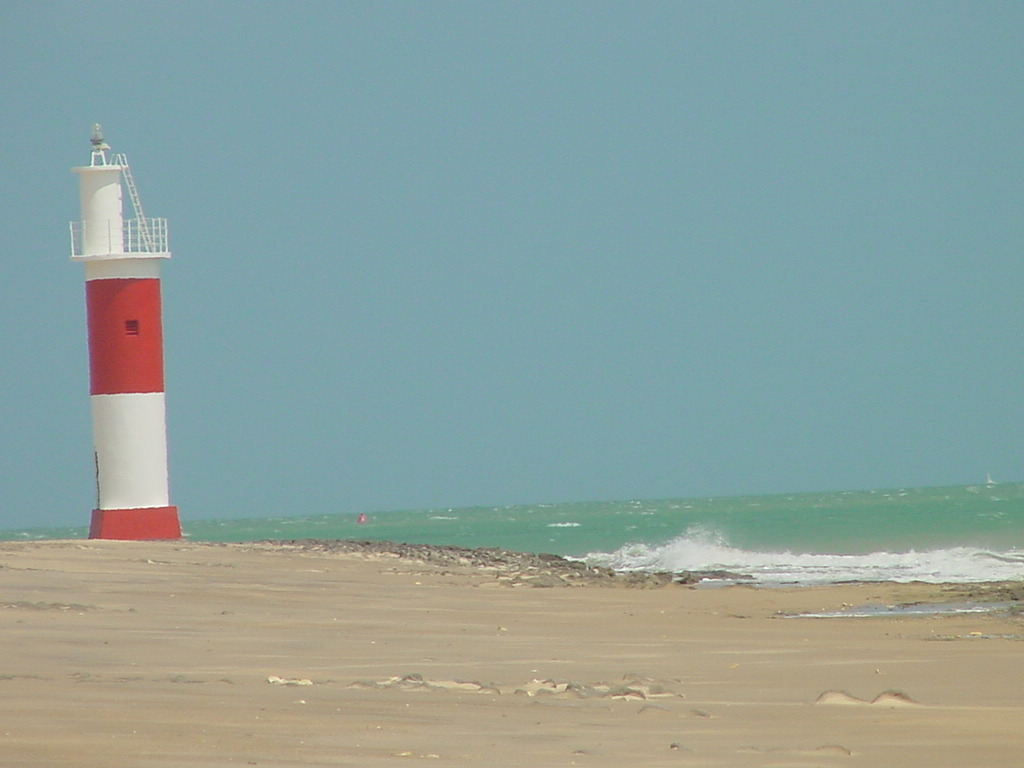 Galinhos, RN, Brasil